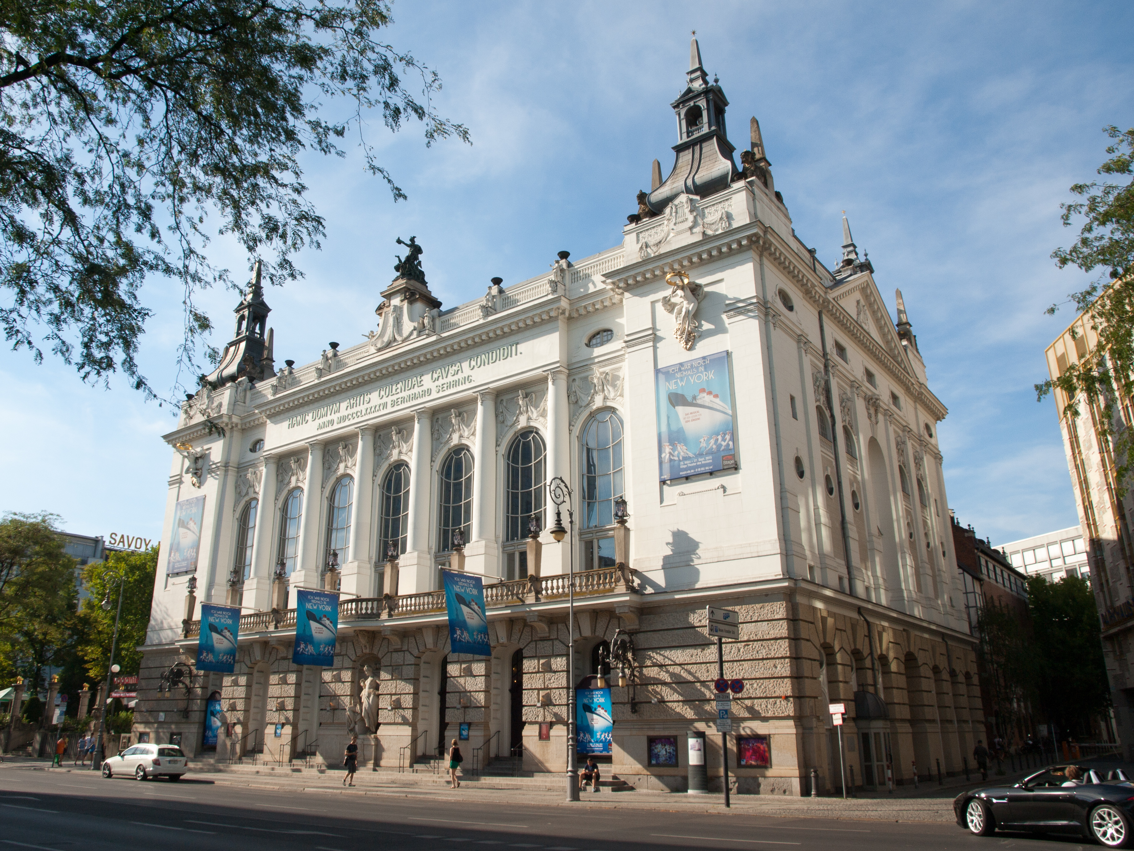 Theater des Westens, Berlin, Charlottenburg, Kantstraße 10–12This is a photograph of an architectural monument.